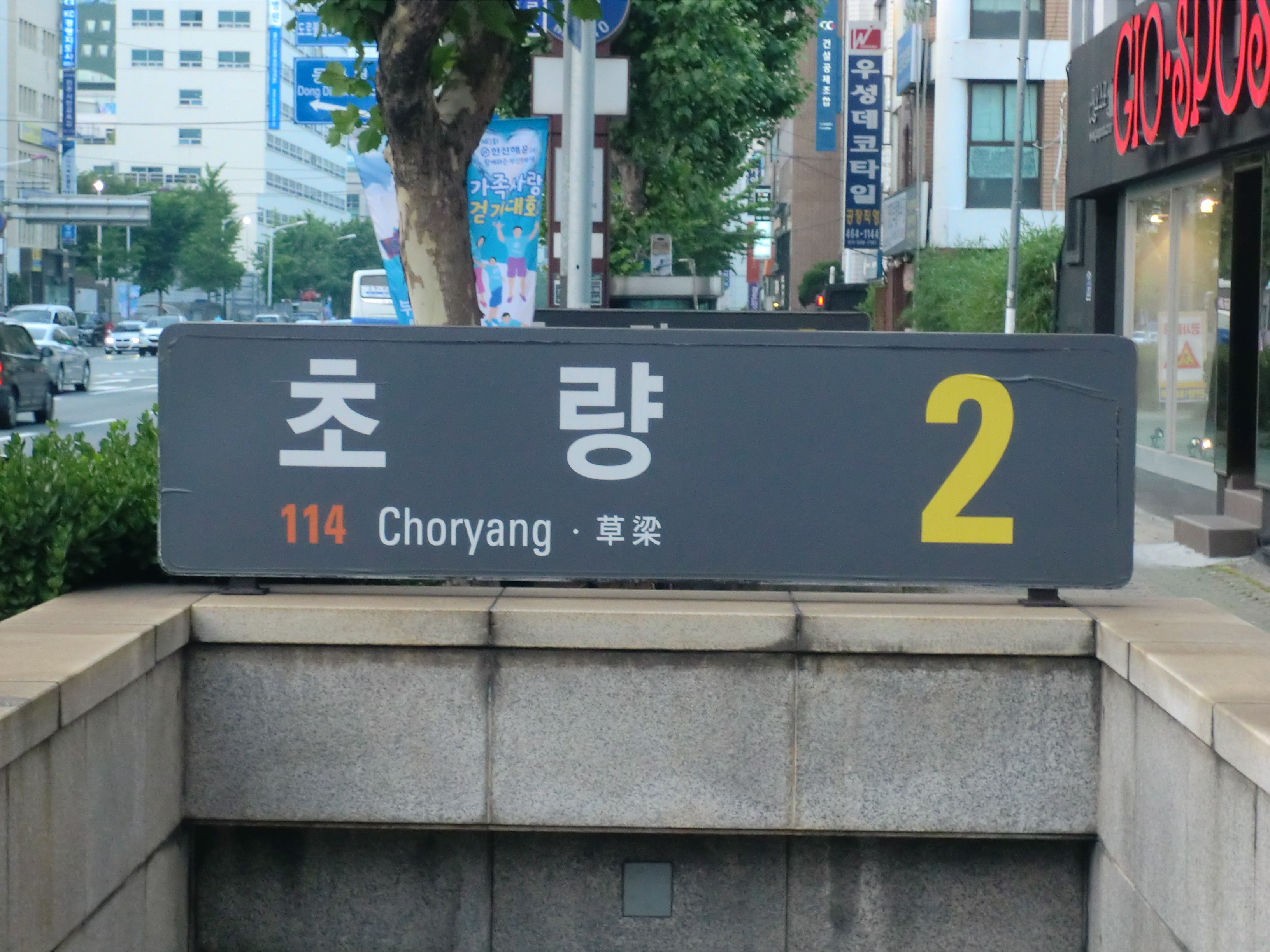 부산도시철도 1호선 초량역 2번출구